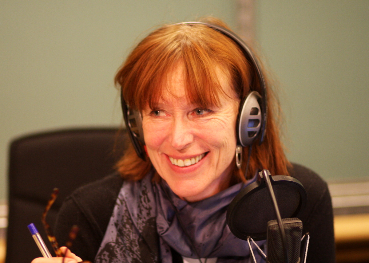 Agnes Moxnes, Journalist og programleder